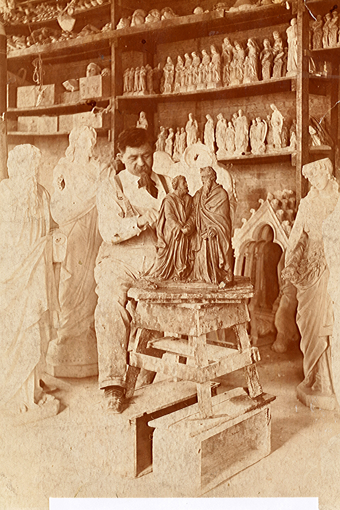 Das Foto zeigt den Bildhauer Sebastian Buscher in seiner Werkstatt in Chicago um 1884Depicted person: Sebastian Buscher